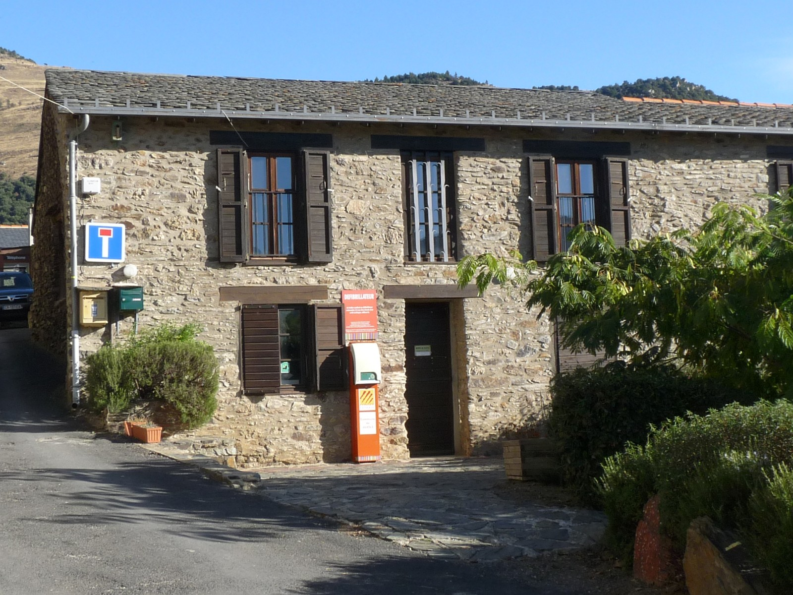 Mairie de Jujols, Pyrénées-Orientales, France